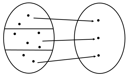 L'immagine mostra una funzione suriettiva definita da un insieme dominio di n=8 elementi ad un insieme codominio di k=3 elementi. L'insieme dominio viene partizionato in 3 blocchi e ognuno di questi è associato dalla funzione ad uno dei 3 elementi del codominio